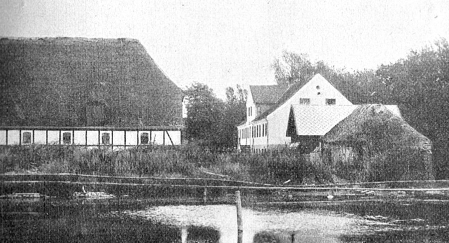 Brockdorff er en lille hovedgård, som er dannet i 1785 af Wilhelm Theophilus von Stieglitz-Brockdorff til Scheelenborg. Brockdorff var en avlsgård under Scheelenborg Gods til 1980. Gården ligger i Stubberup Sogn, Bjerge Herred, Kerteminde Kommune.